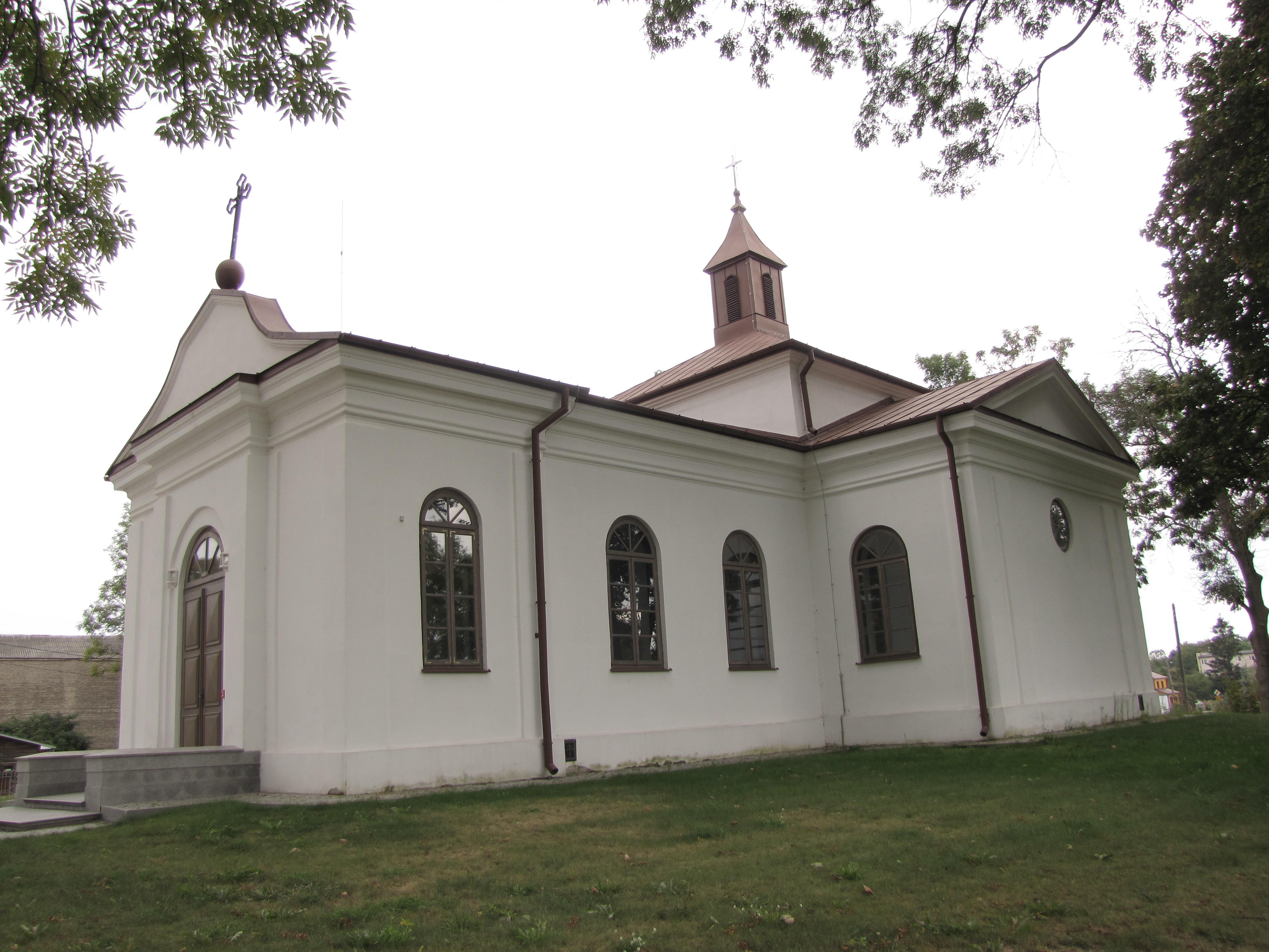 Wisznice - cerkiew greckokatolicka (unicka), obecnie kościół rzymskokatolicki p.w. św. Jerzego i Wniebowzięcia Najświętszej Maryi Panny, 1870-1872